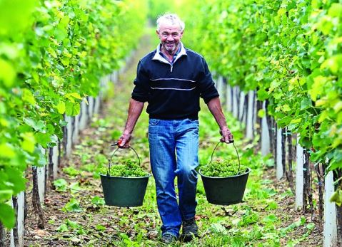 Viñedo de la provincia de Minho en Porgutal